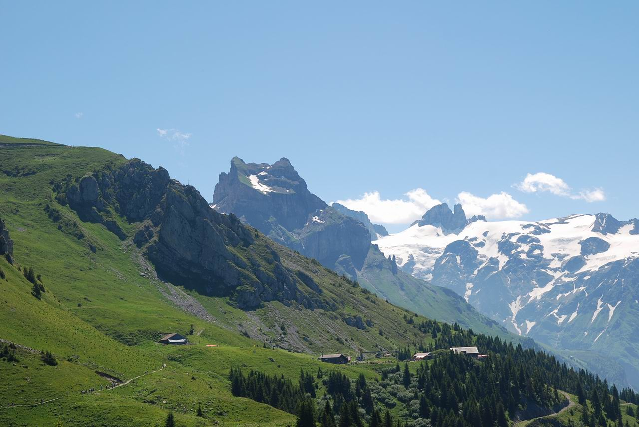 Brunnihuette